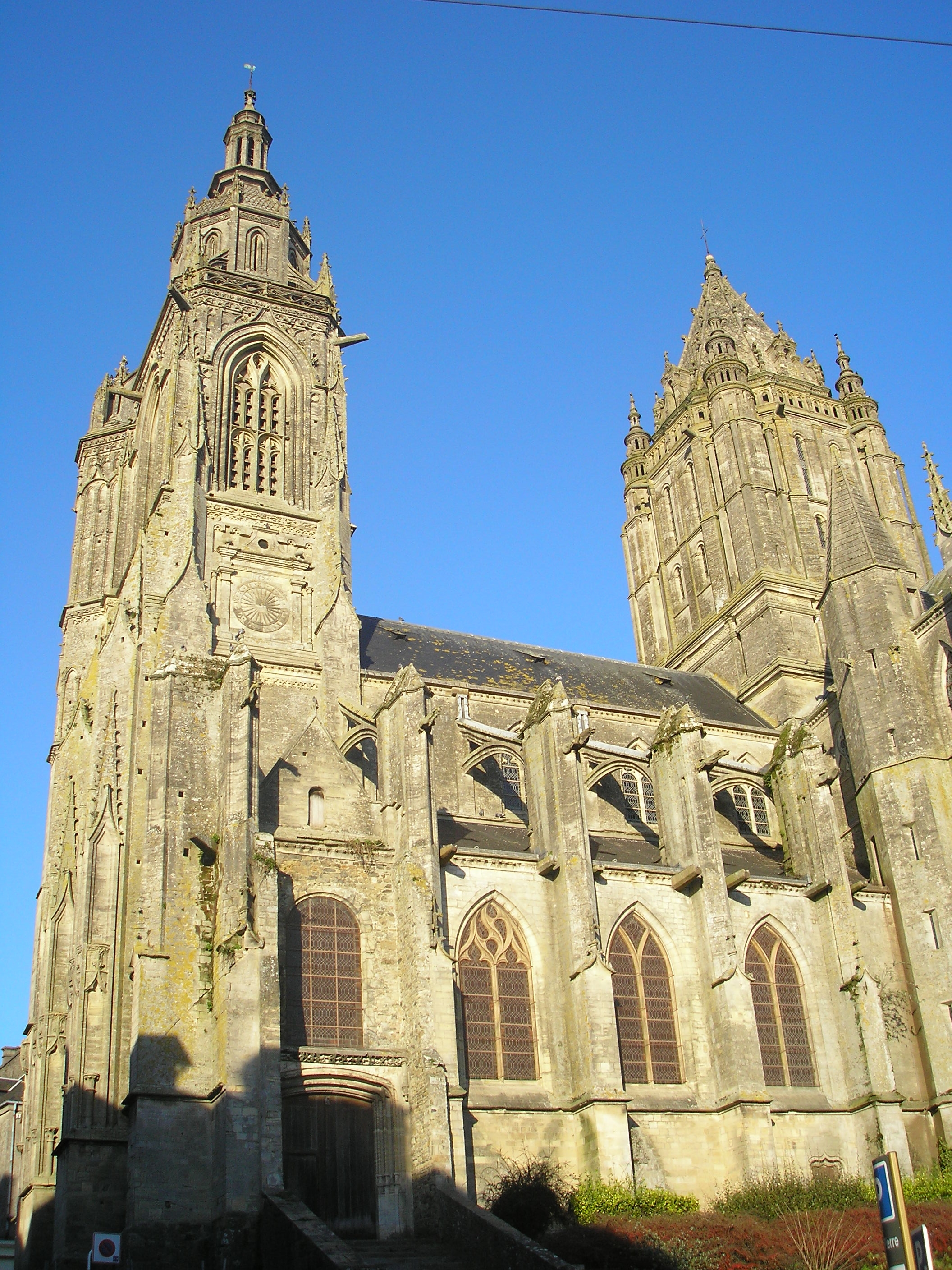 Coutances (Normandie, France). L'église Saint-Pierre.